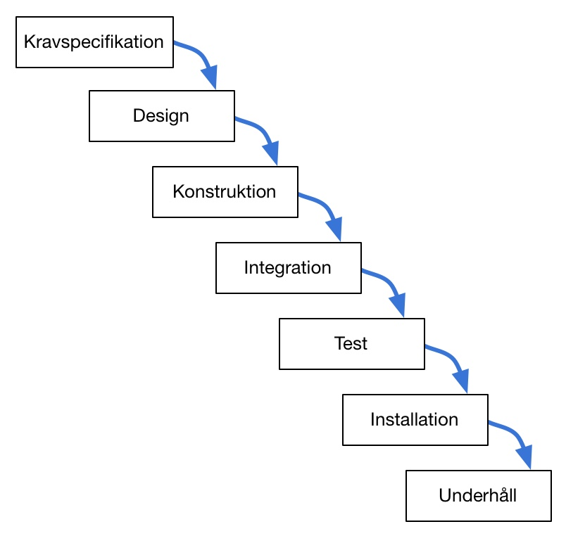 Modell över vattenfallsmetoden.